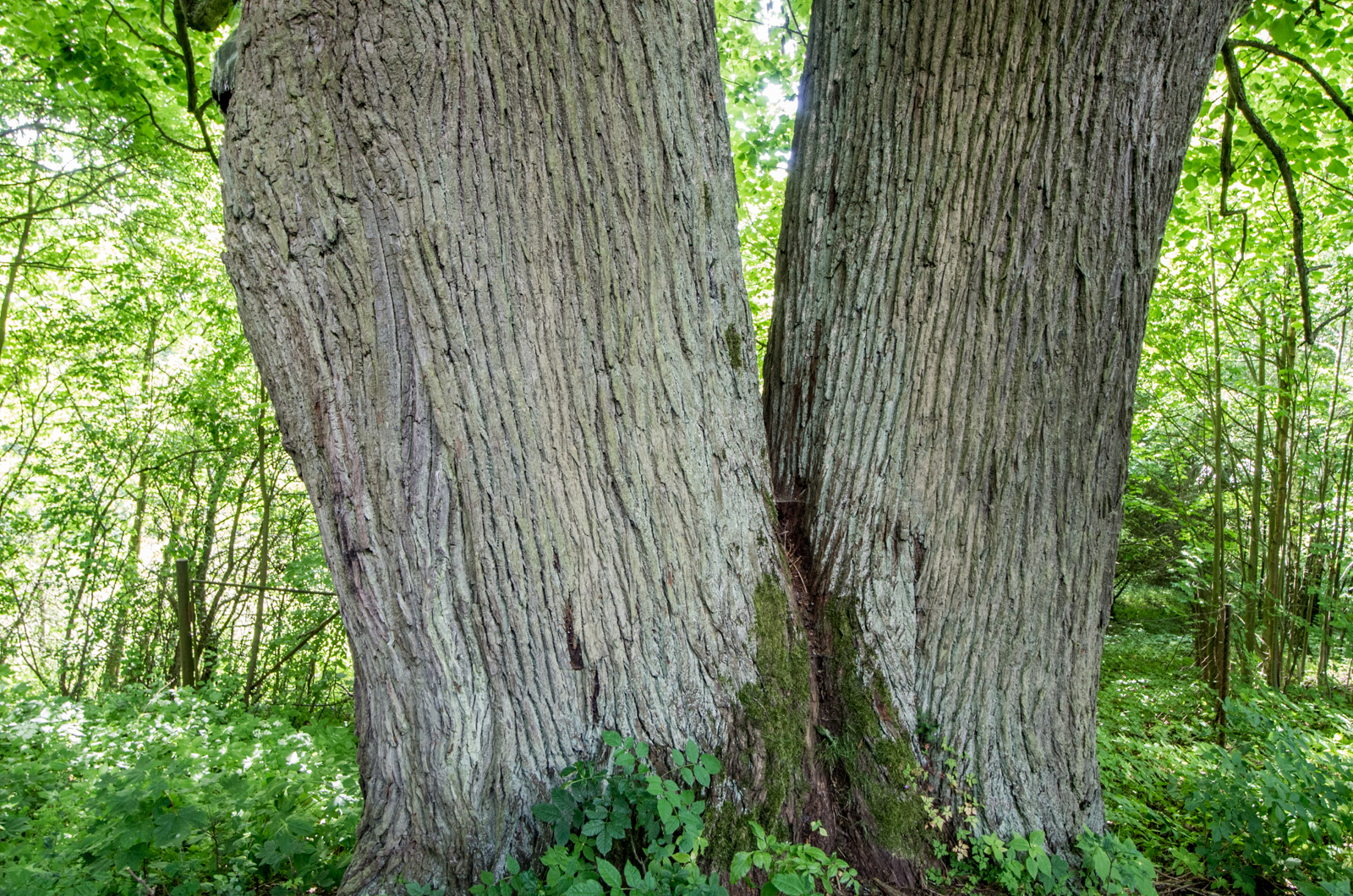 památný strom - Lípa za kynžvartským kostelem, Lázně Kynžvart, okres Cheb